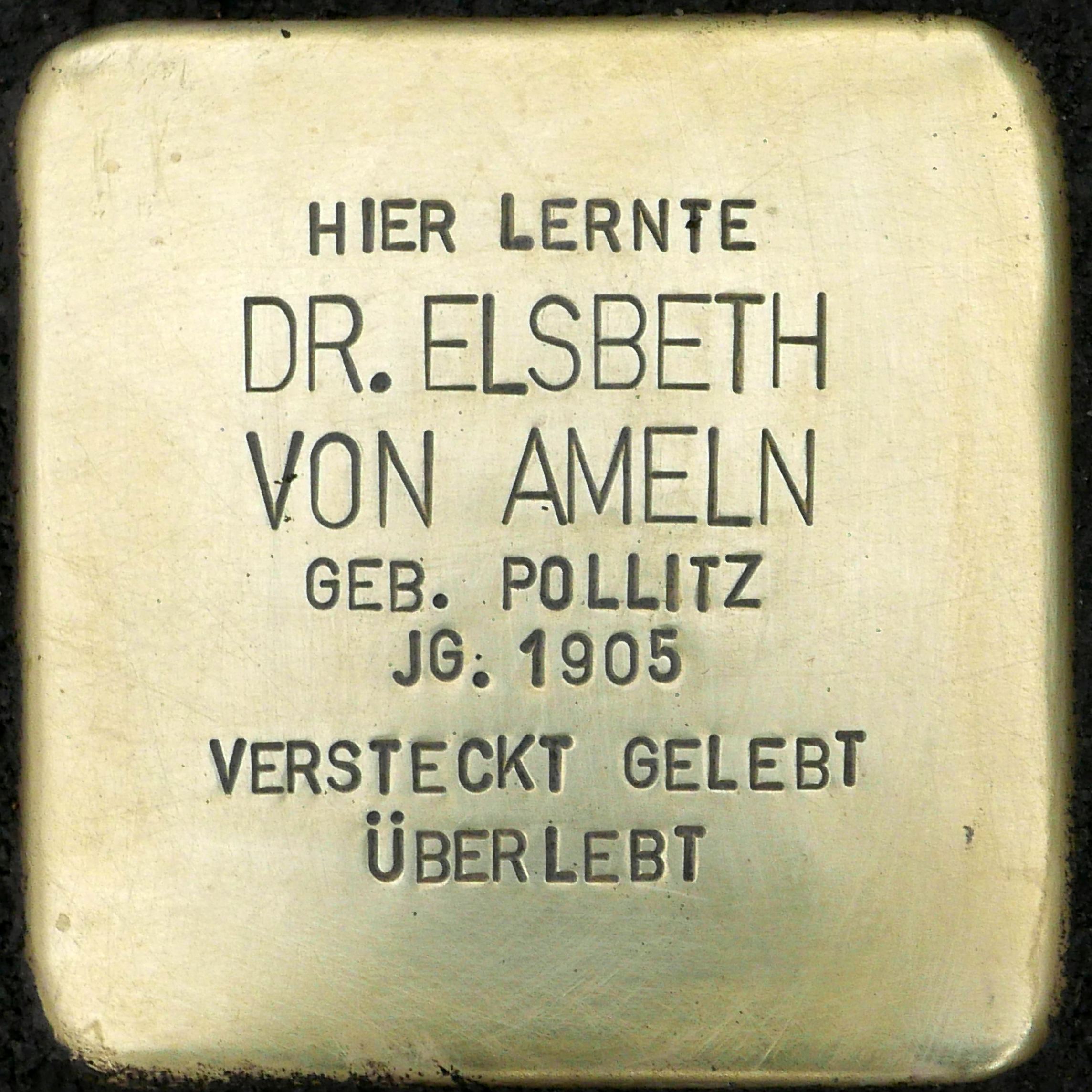 Stolpersteinverlegung am 18. März 2019, Stolperstein für Elsbeth von Ameln, Königin Luise Schule, Alte Wallgasse 10